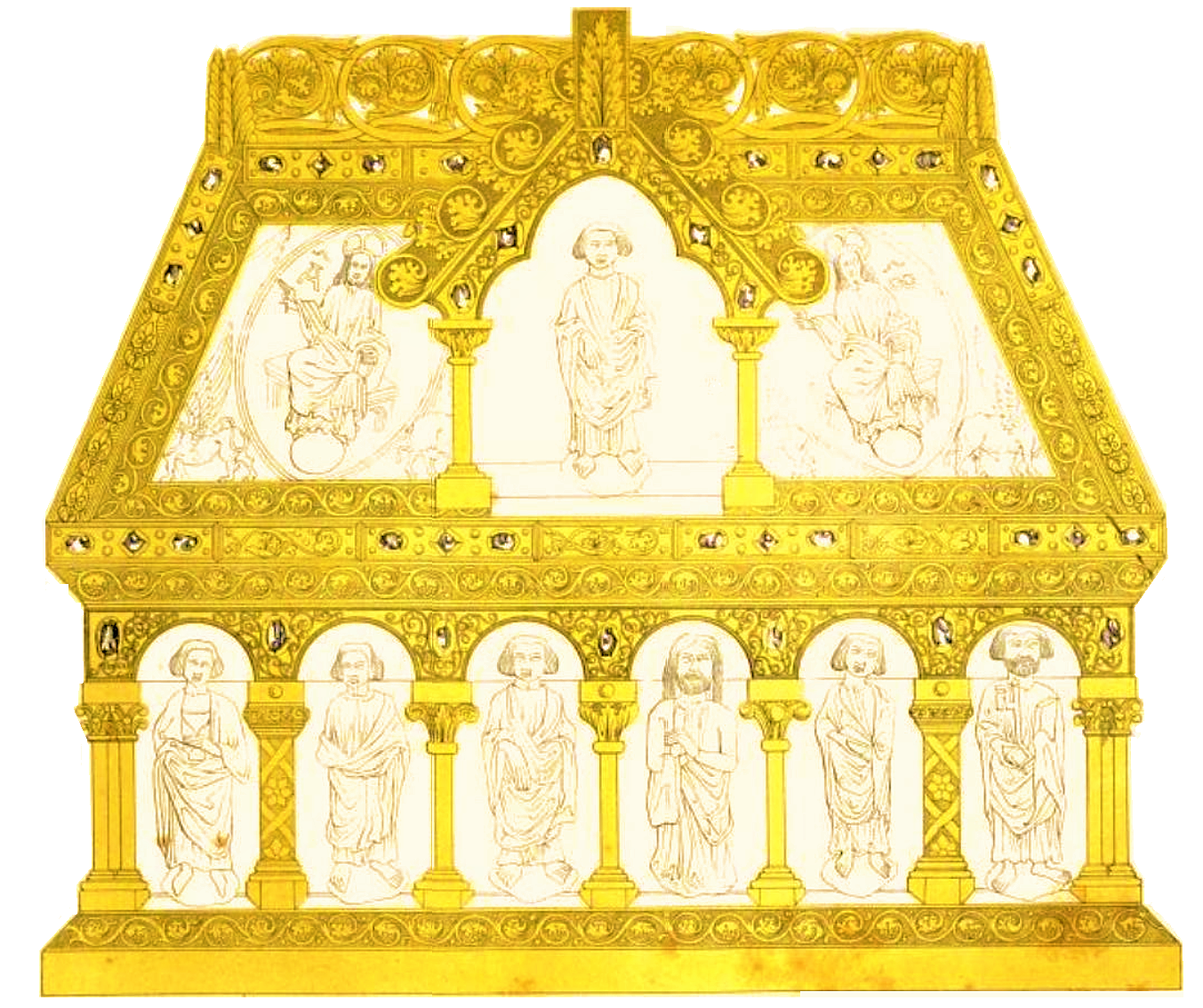 Abbaye de Saint-Evroult, Orne, Châsse (gravure ancienne retouchée)